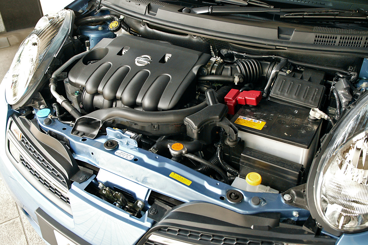 Nissan HR16DE engine